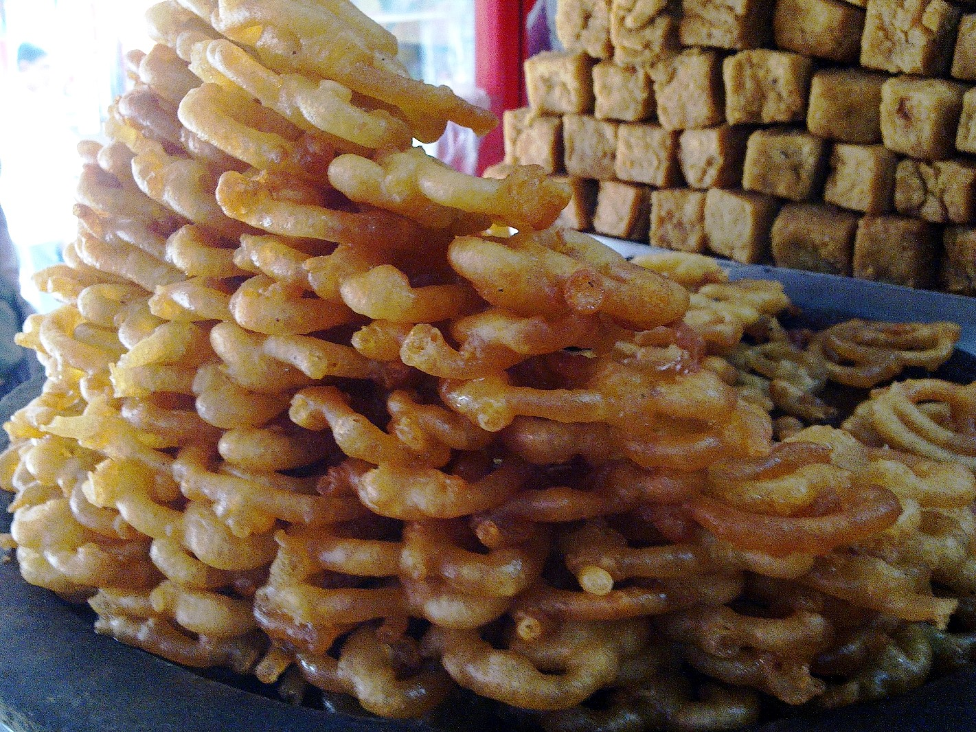 jilebi and jaggery bricks sundarbans13_2015-11-25_12-54